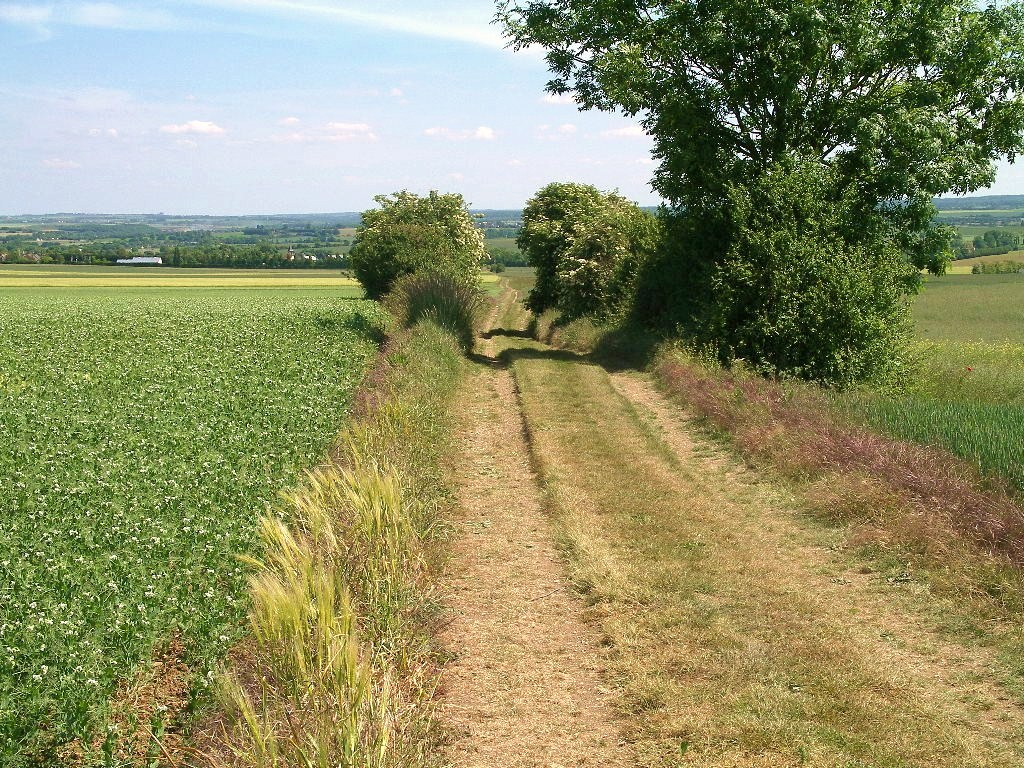 Le Chemin Haussé ou Chemin du Duc Guillaume, voie romaine traversant la plaine de Caen